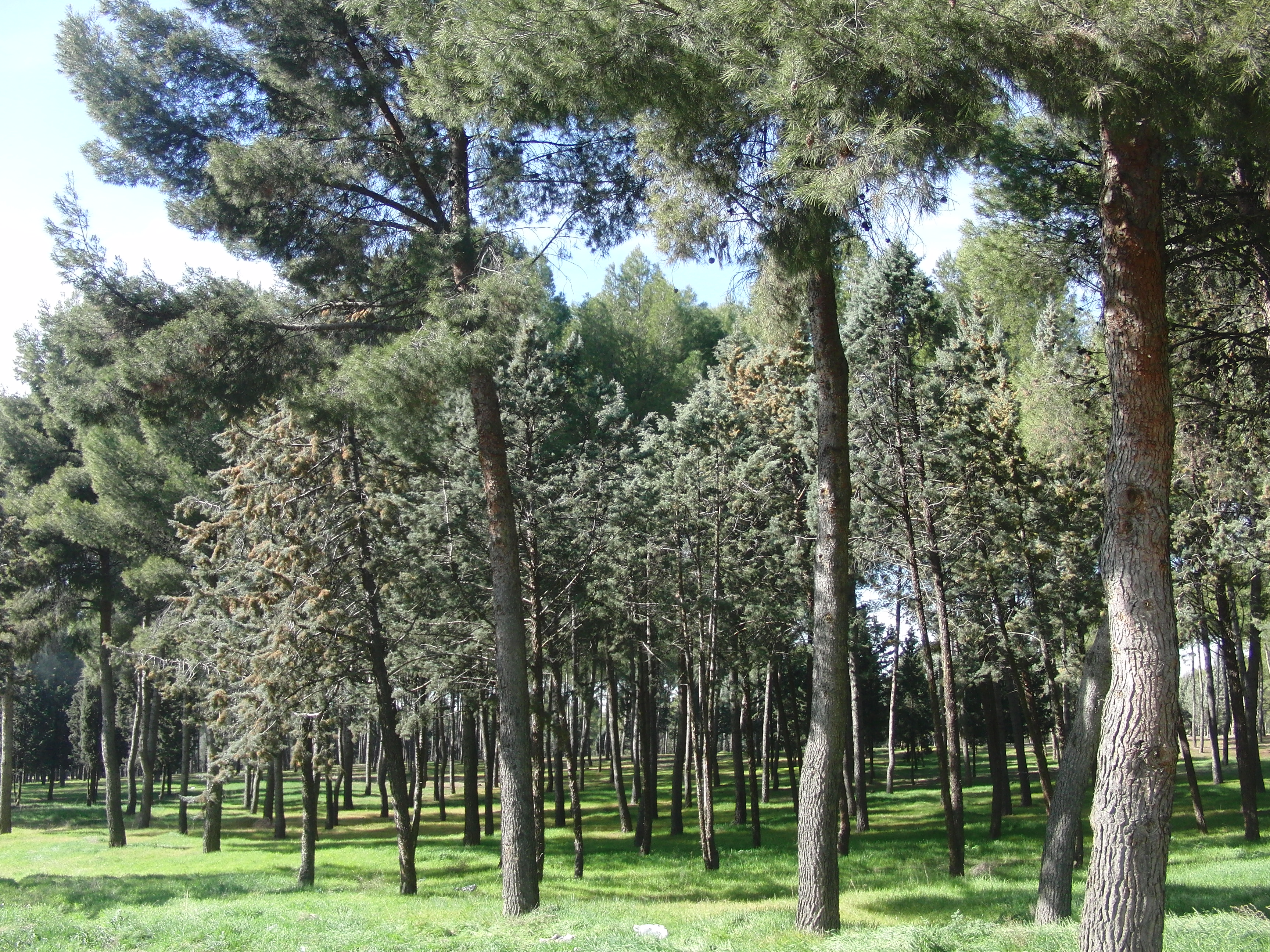 Parque Forestal de Entrevías